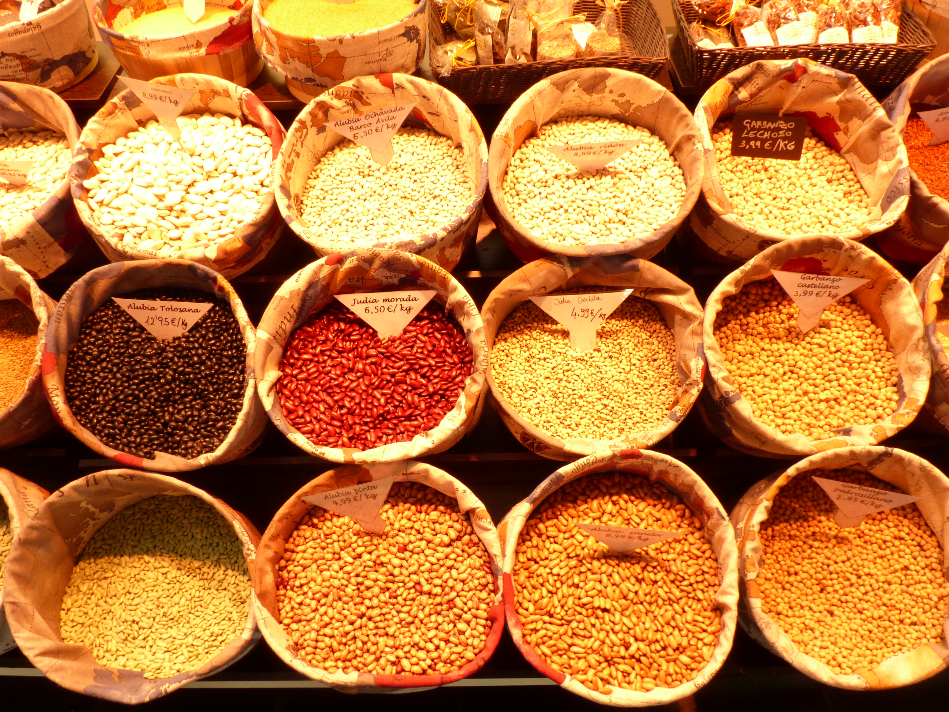 Mercado de San Antón, multicolor.